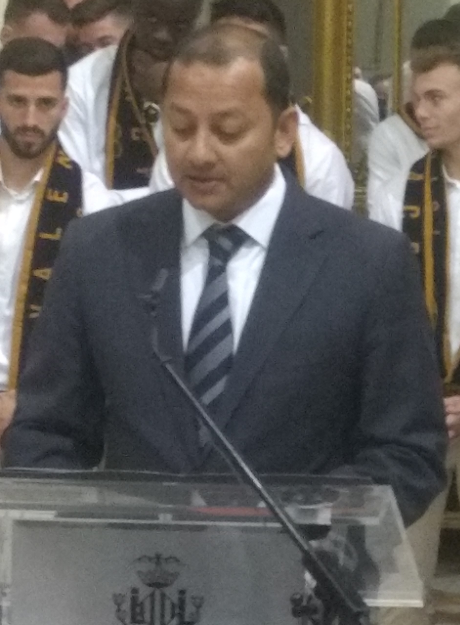 Anil Murhty amb els jugadors del València CF ens els actes oficials pel títol de copa.